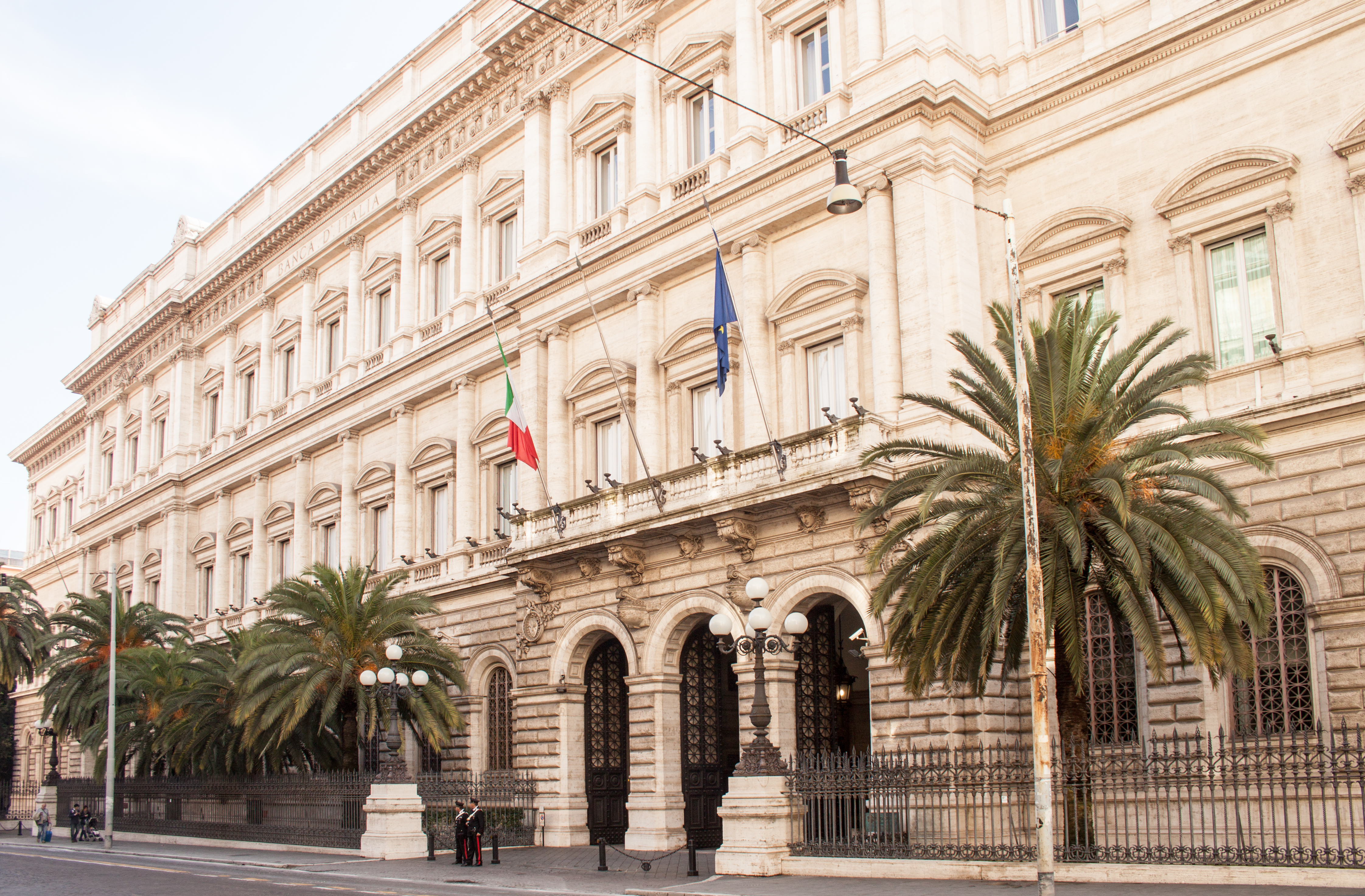 Palazzo Koch, Via Nazionale, Roma